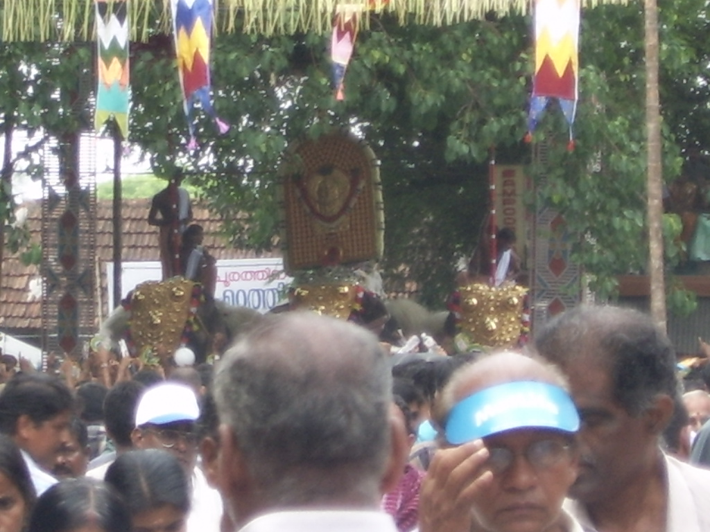 മഠത്തിൽ വരവ്, തിരുവമ്പാടി കൃഷ്ണന്റെ എഴുനുള്ളിപ്പ്